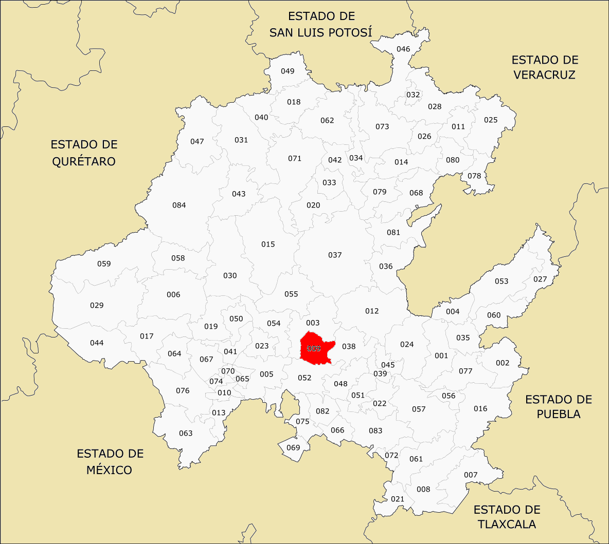 Municipio de Hidalgo